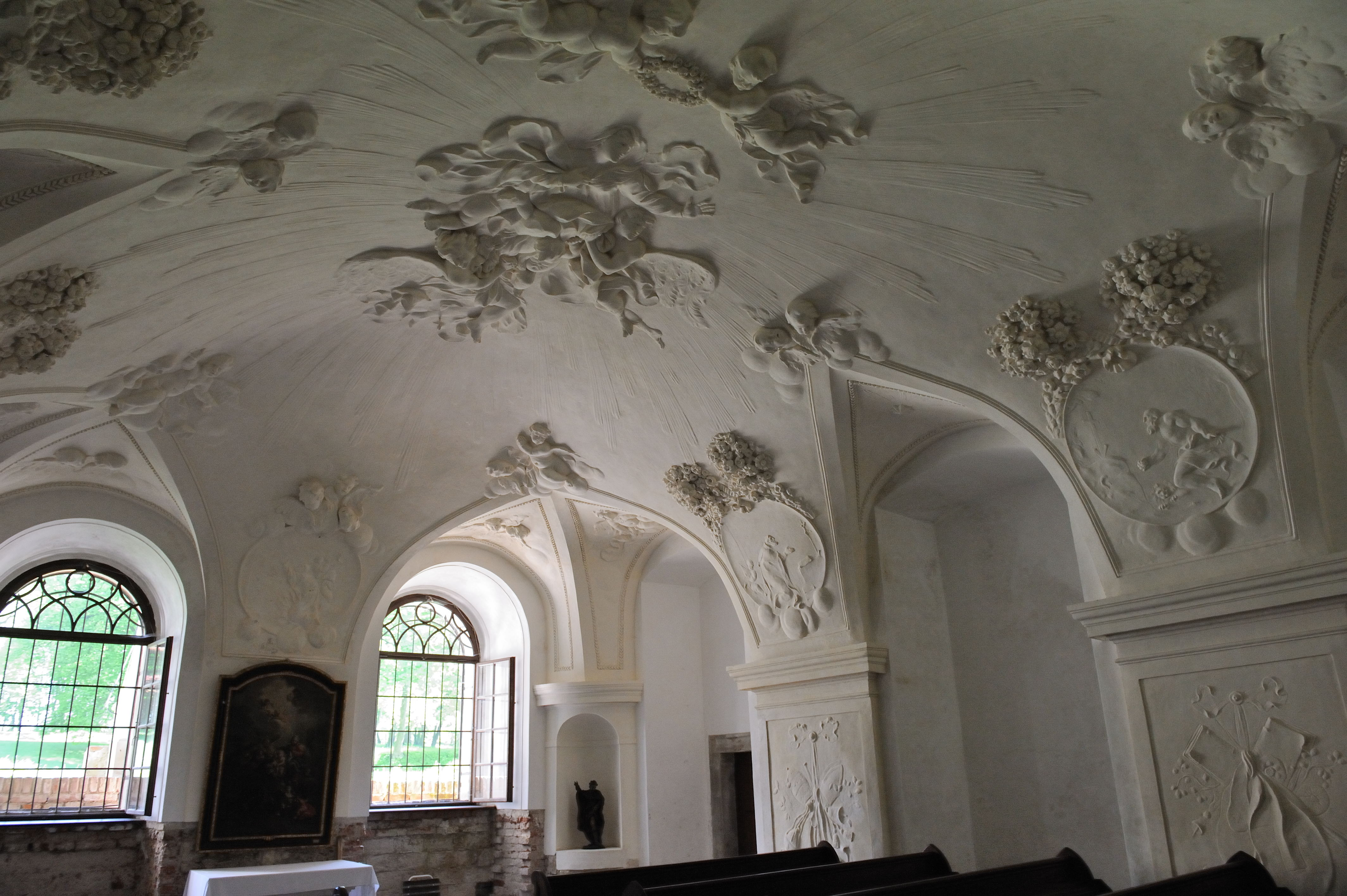 Zámek Uherčice, Uherčice 1